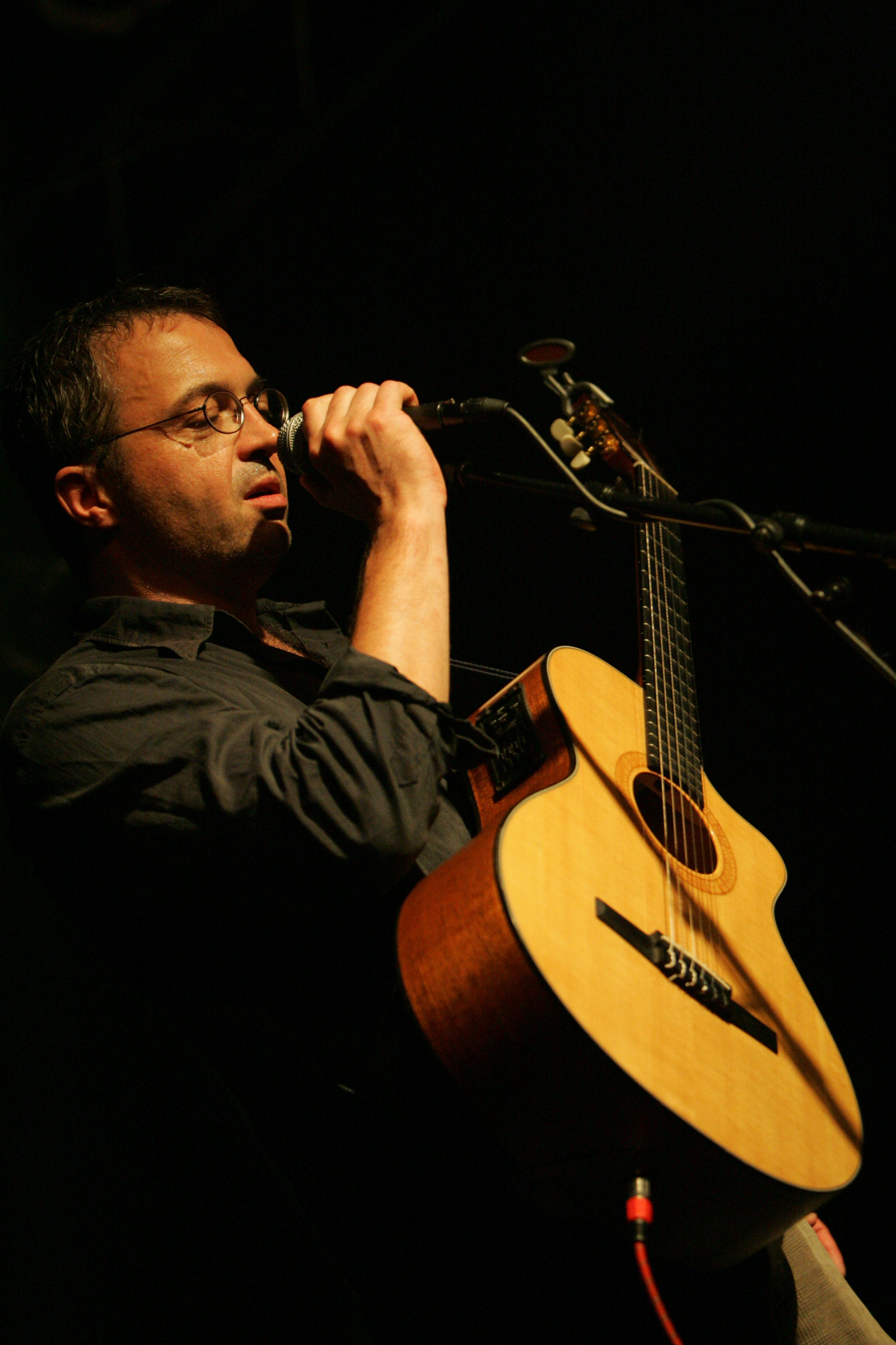 Götz Widmann während einer Promotour